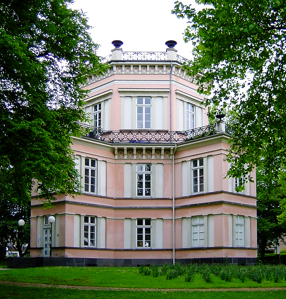 Haus Greifenhorst, Krefeld This image shows a heritage building in Germany, located in the North Rhine-Westphalian city Krefeld (no. 75).